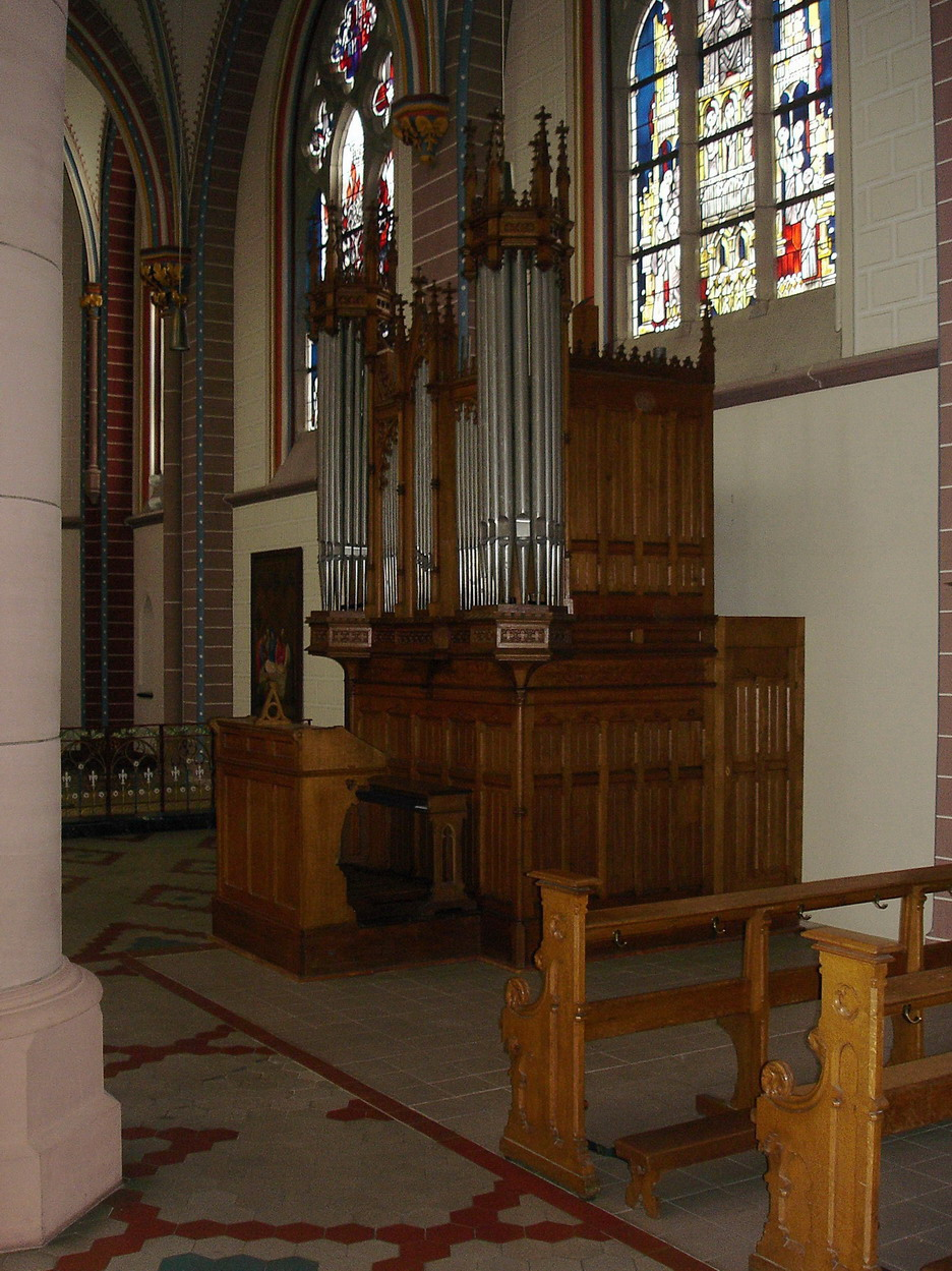 Chororgel der Bonner Marienkirche